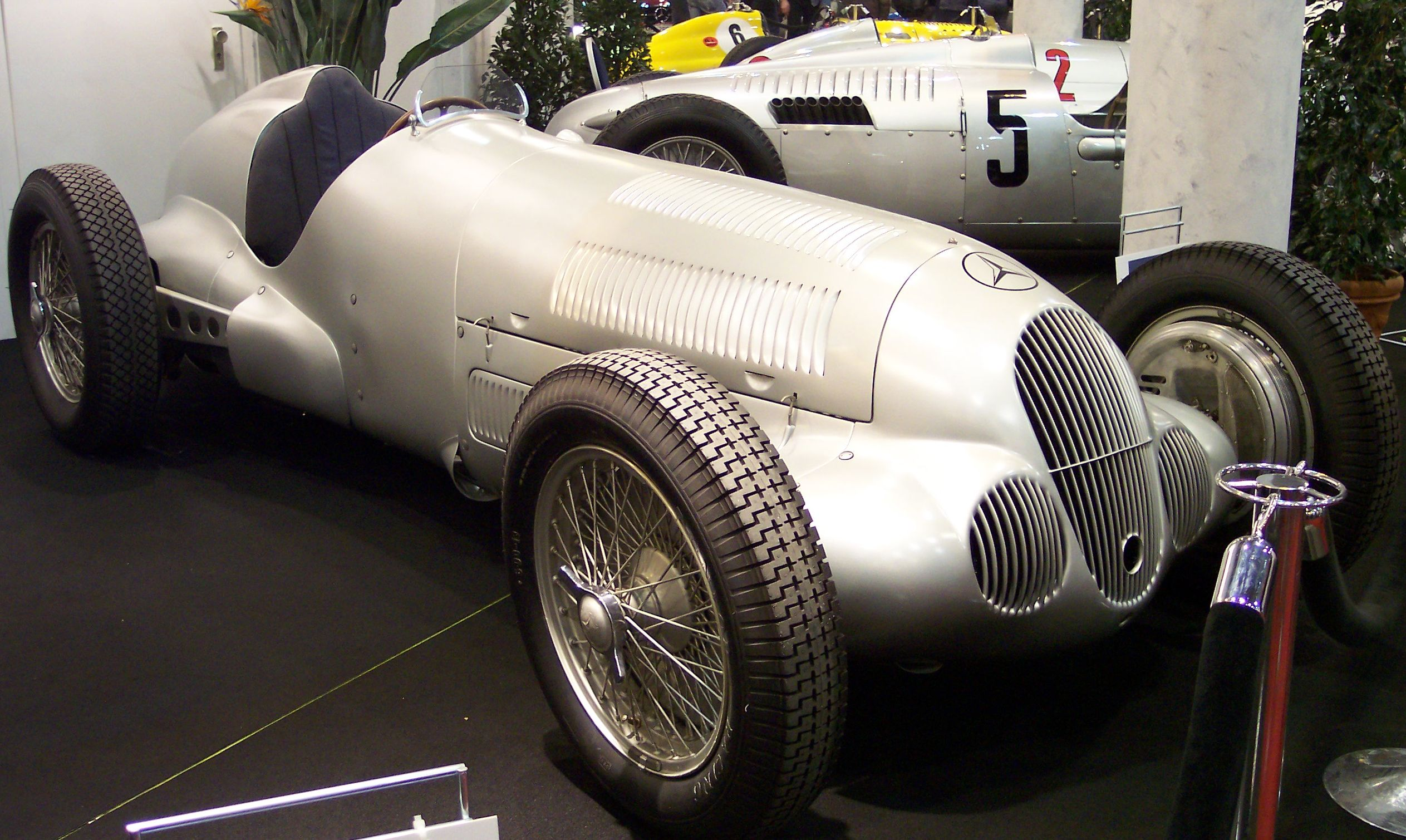 Source: Eigenes Bild